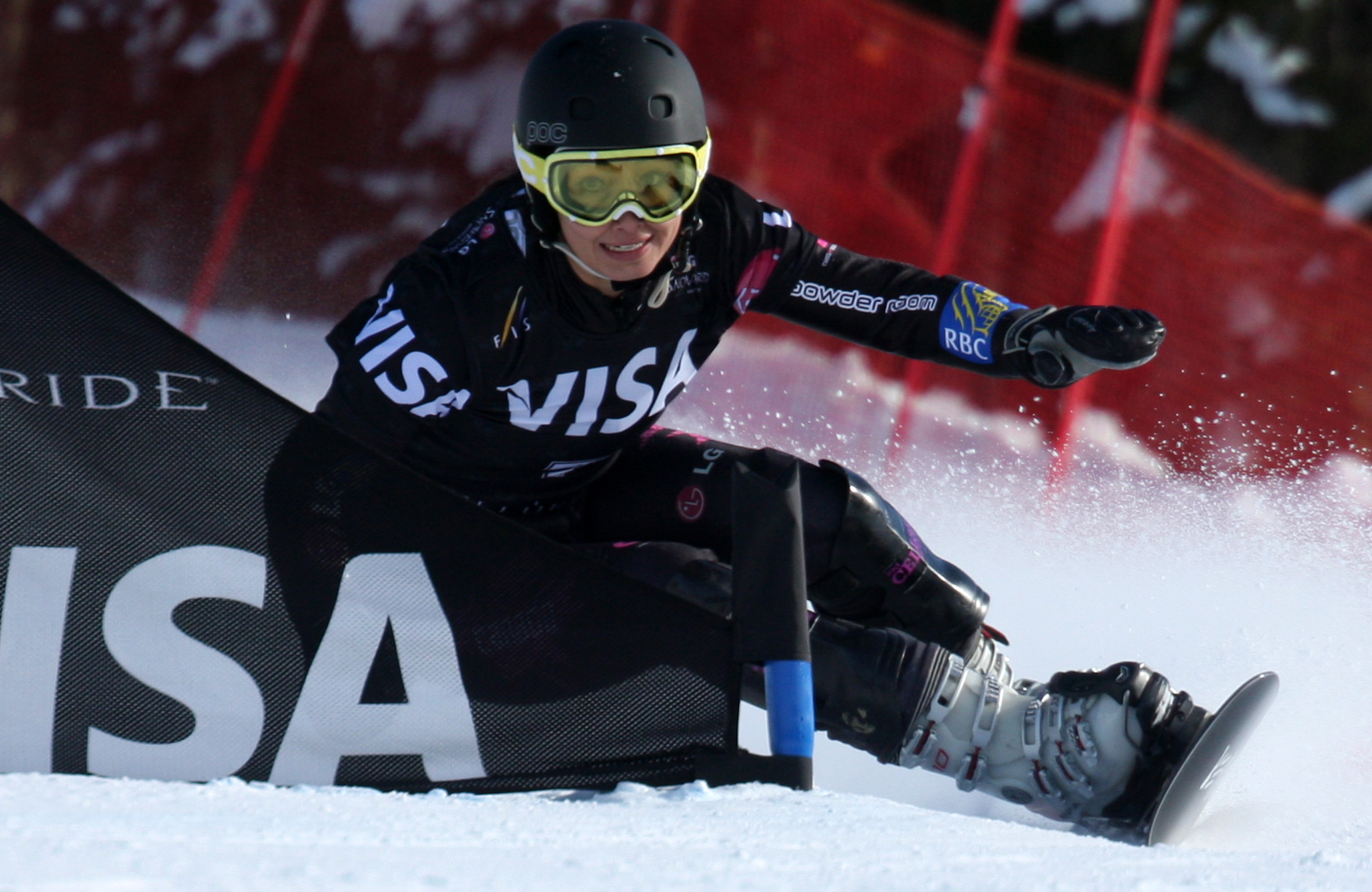 Telluride_PGS_Kimiko_Zakreski_CAN